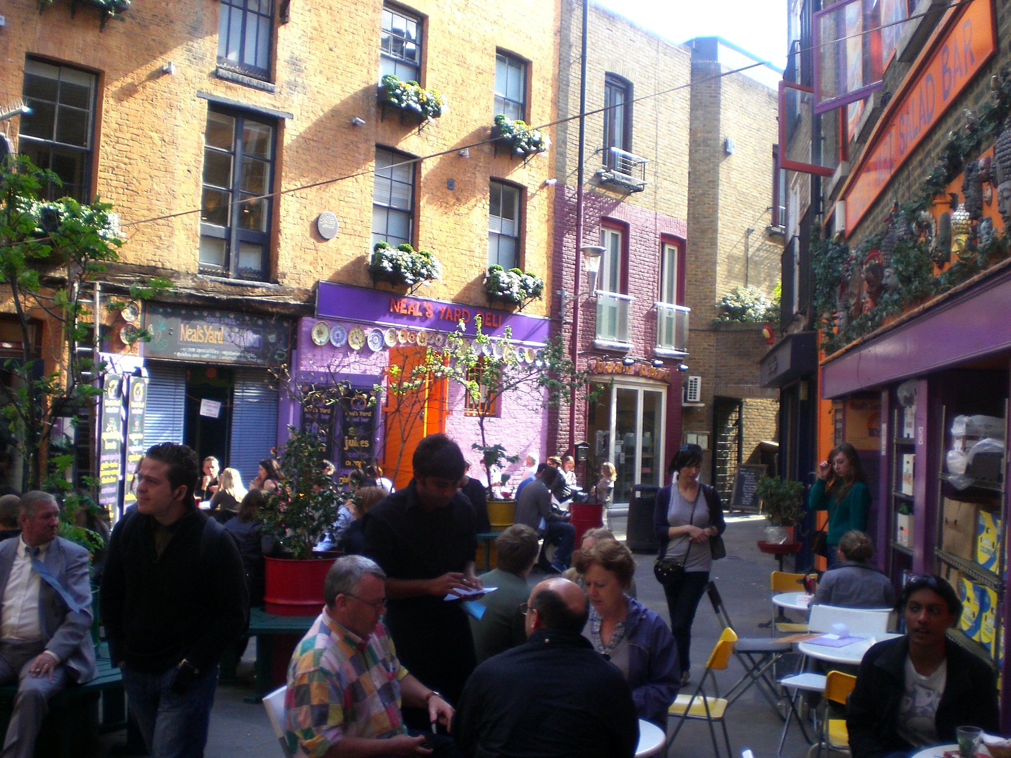 Bars de Neal's Yard